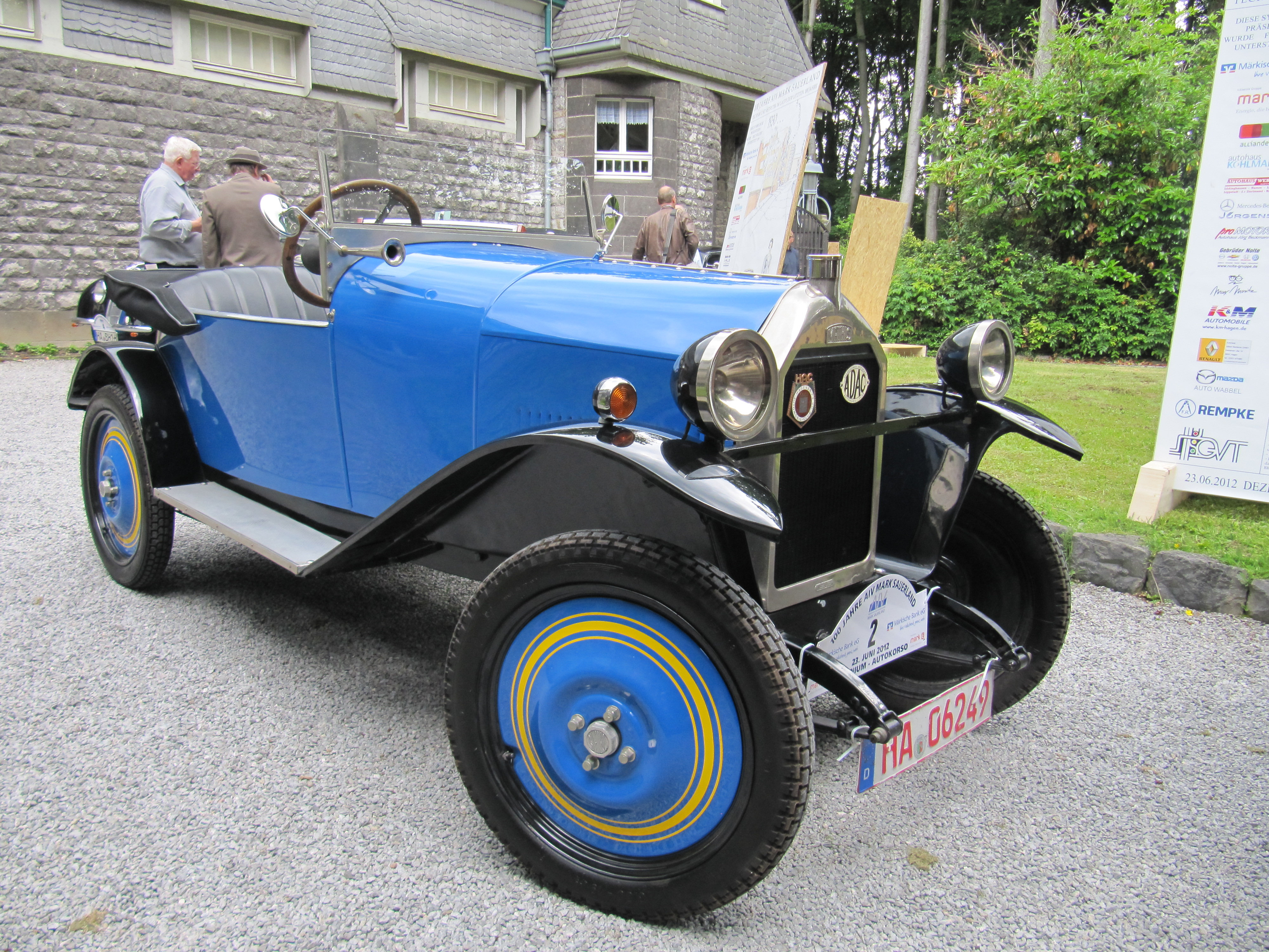 Auto Mathis PM Torpedo von 1922